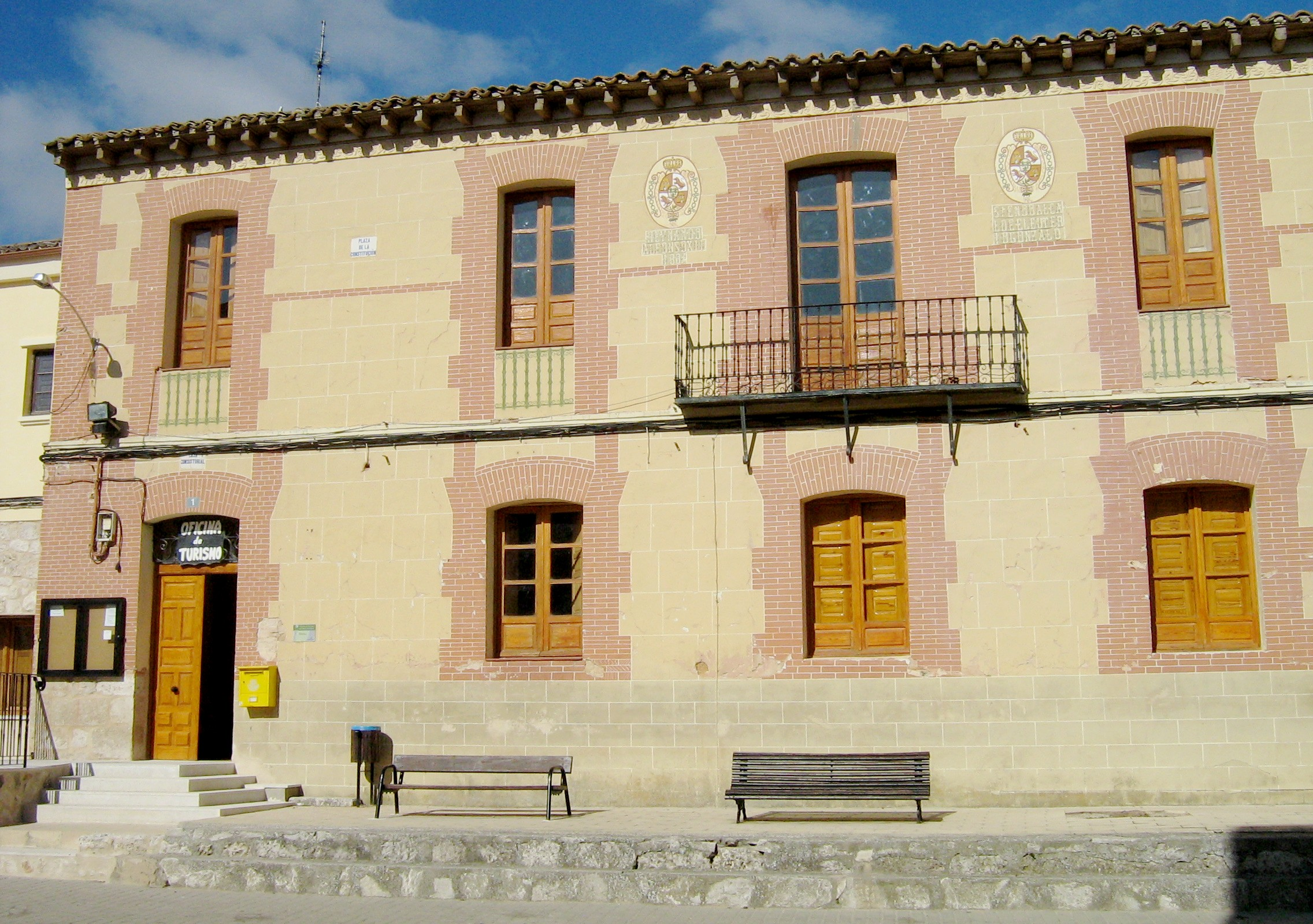 Curiel de Duero. Ayuntamiento. Oficina de Turismo. Valle del Cuco. Ribera del Duero. Valladolid.